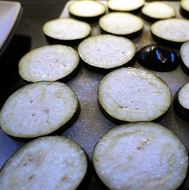 Sichtbar das aus der Aubergine austretende Wasser.